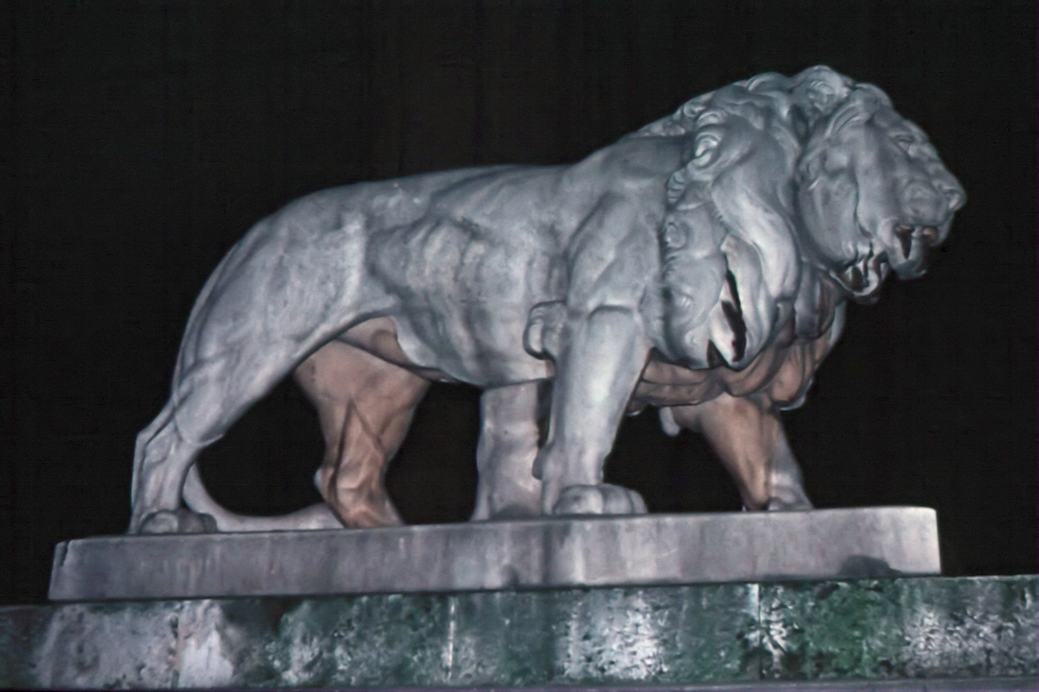 Deutschland, Bayern, München, Feldherrnhalle, Steinerner Löwe